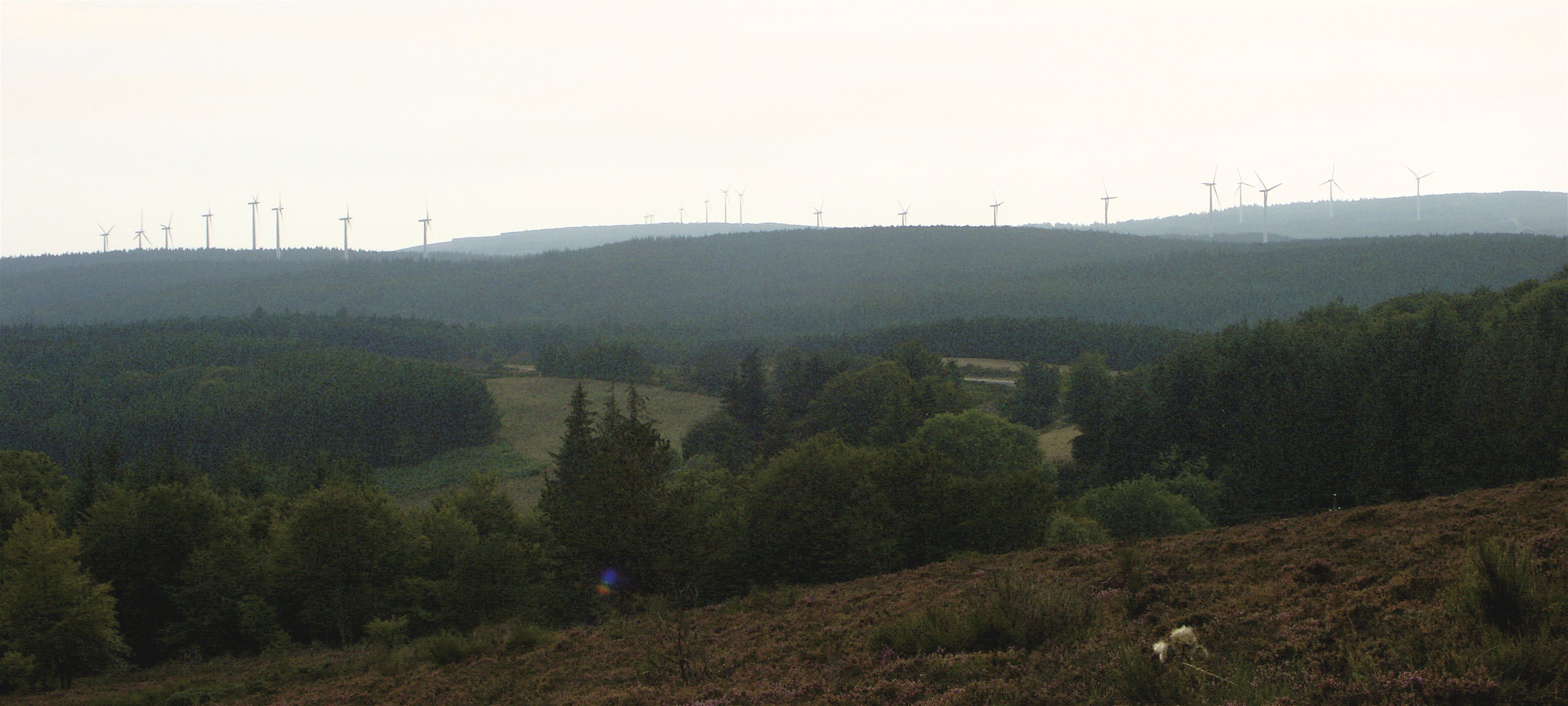 Éoliennes de l'Espinouse (1er plan la ferme de l'Espinouse au loin les éoliennes de Cambon )